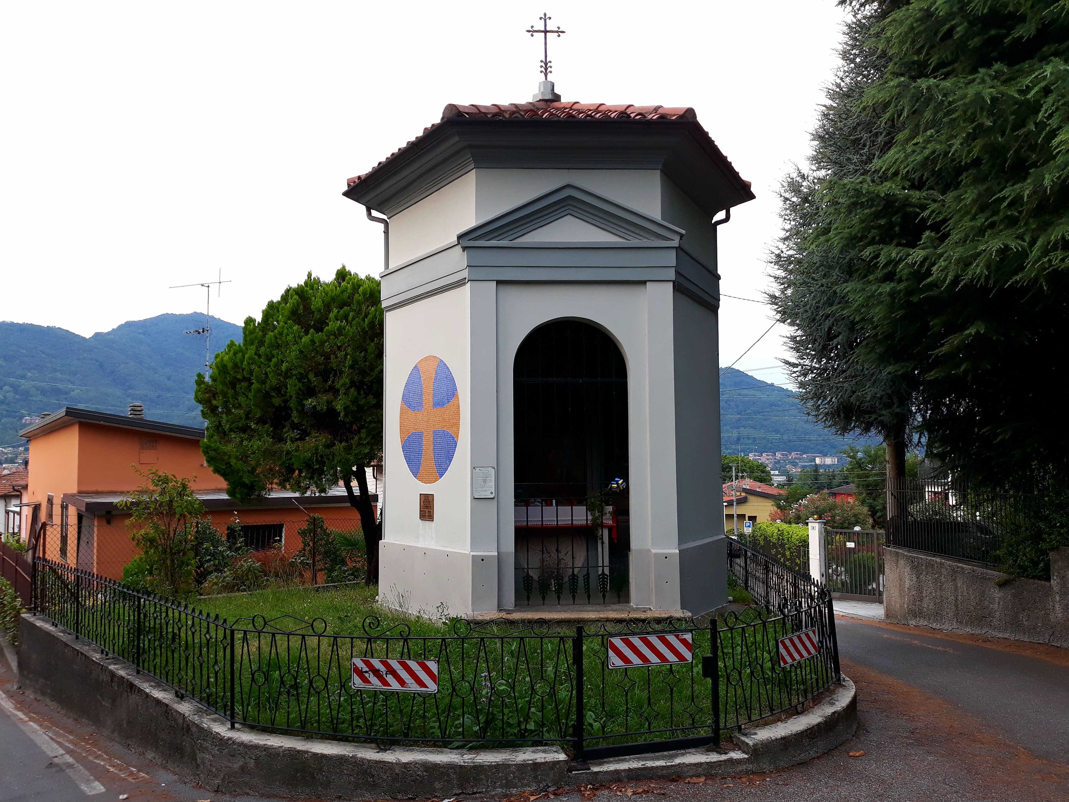 Cappella di San Mauro a Vercurago